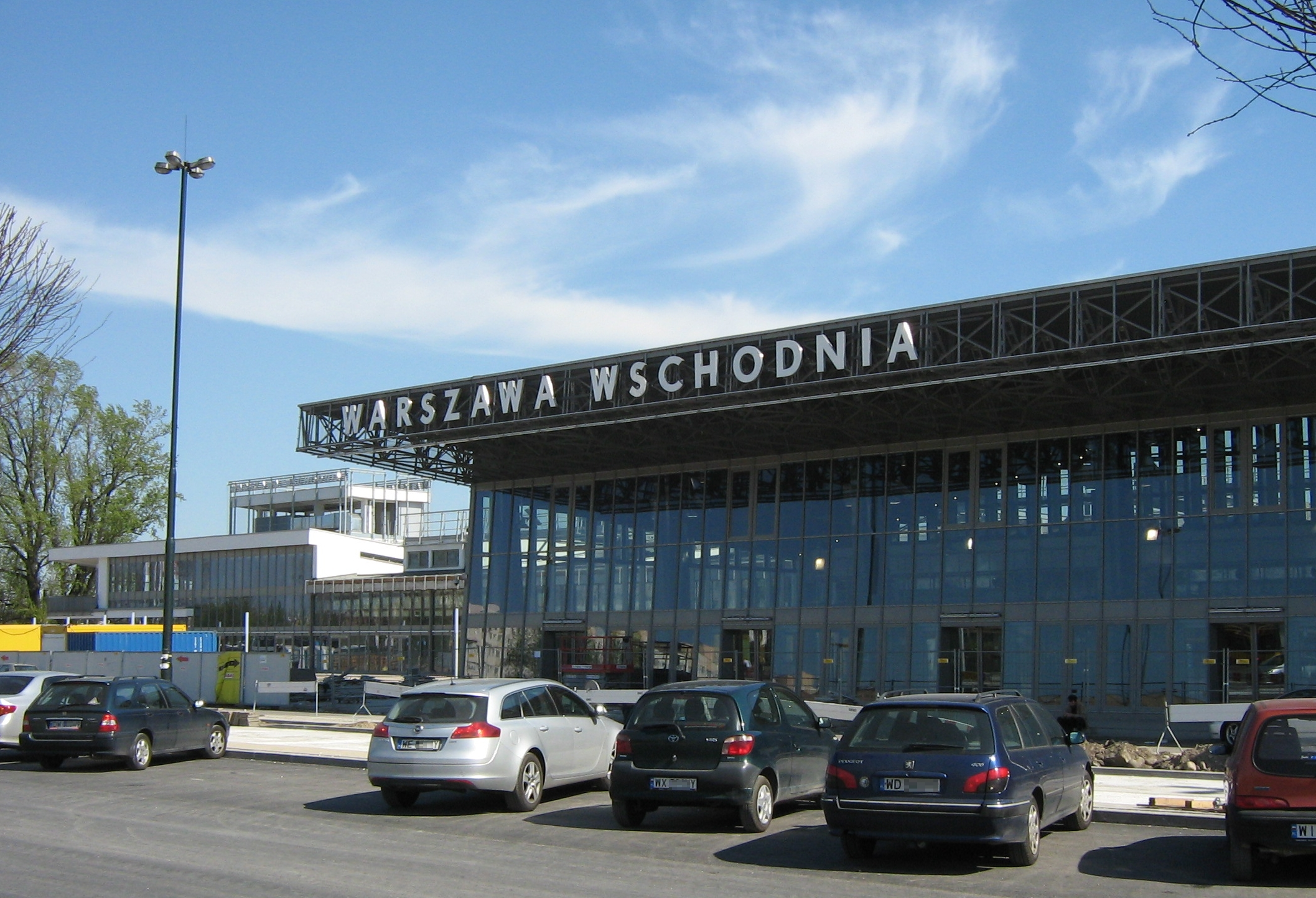 Świeżo wyremontowane w kwietniu 2012 r. wejście na dworzec Warszawa Wschodnia